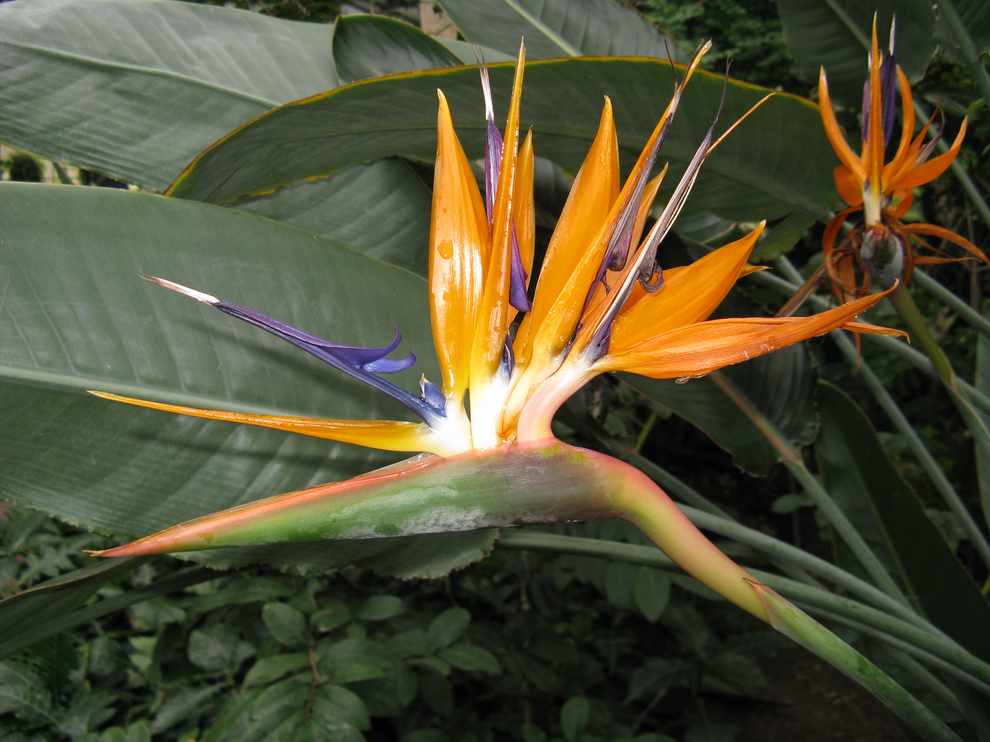 Strelitzia reginae